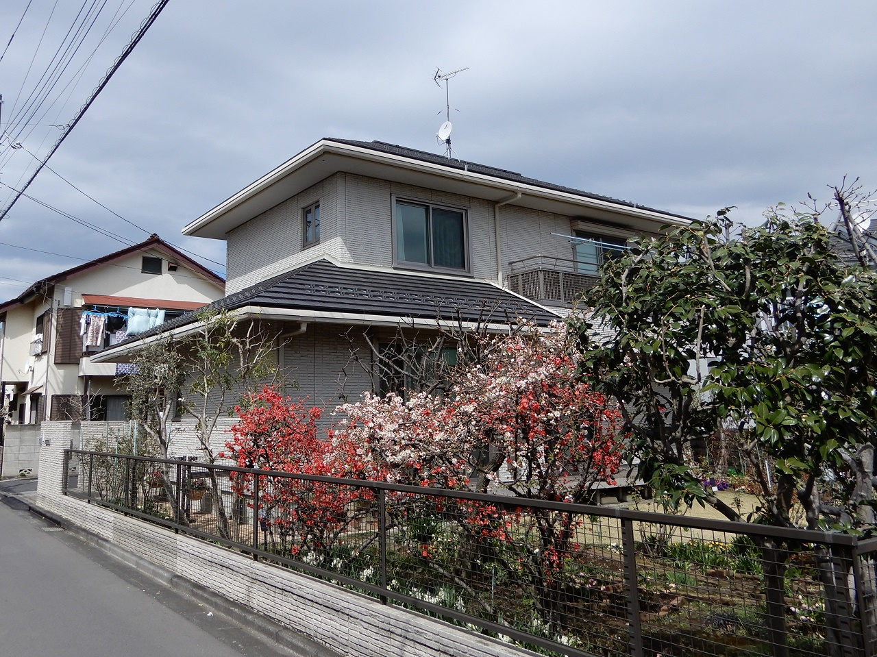 東町3丁目（元文化住宅地）